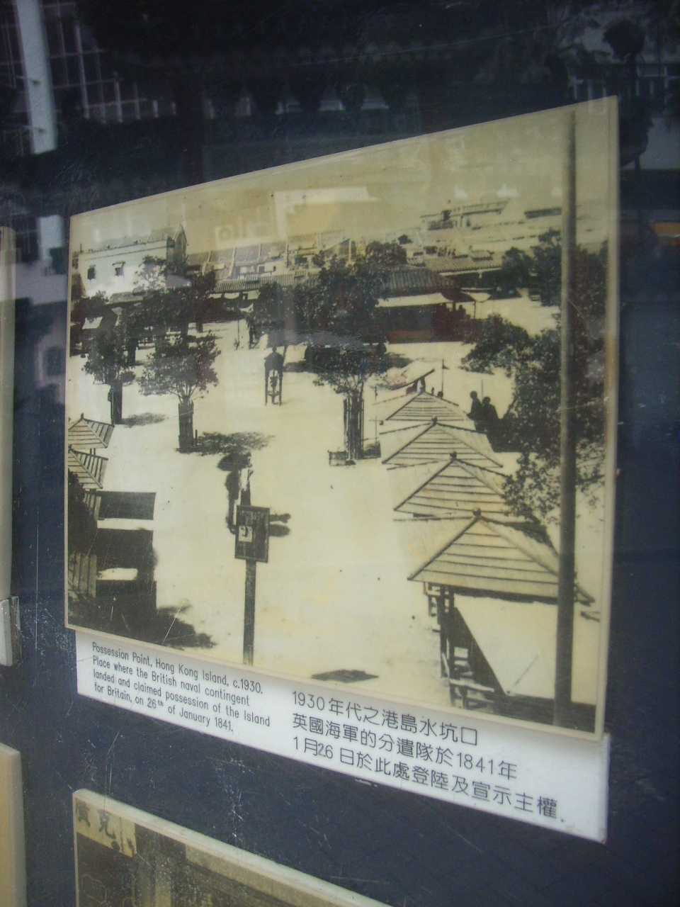 荷李活道公園近水坑口街, 港島巴士26號荷李活道西行第個車站下車中西區普仁街街口附近 Hollywood Road, Sheung Wan, Hong Kong